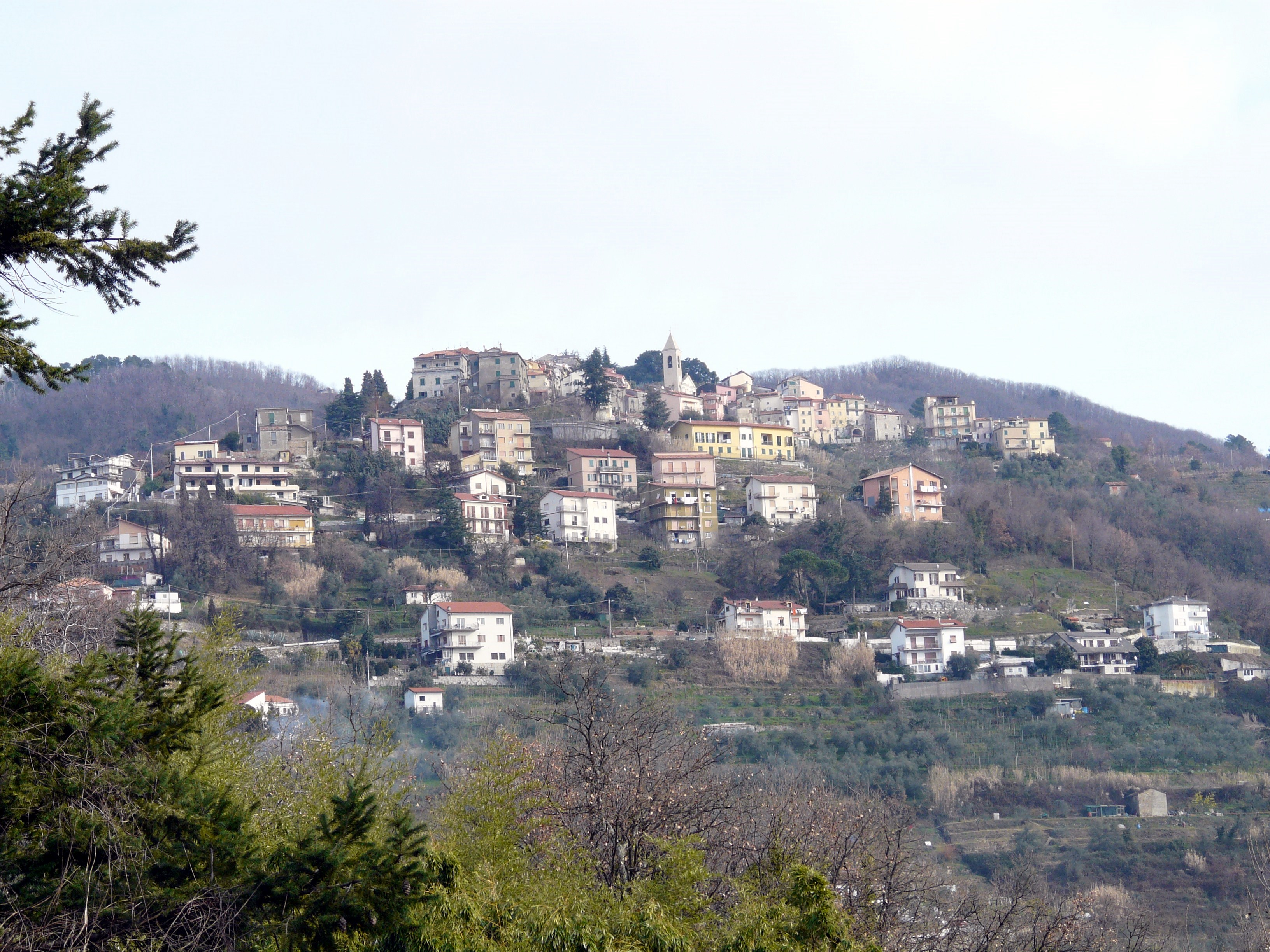 Bolano, Liguria, Italia